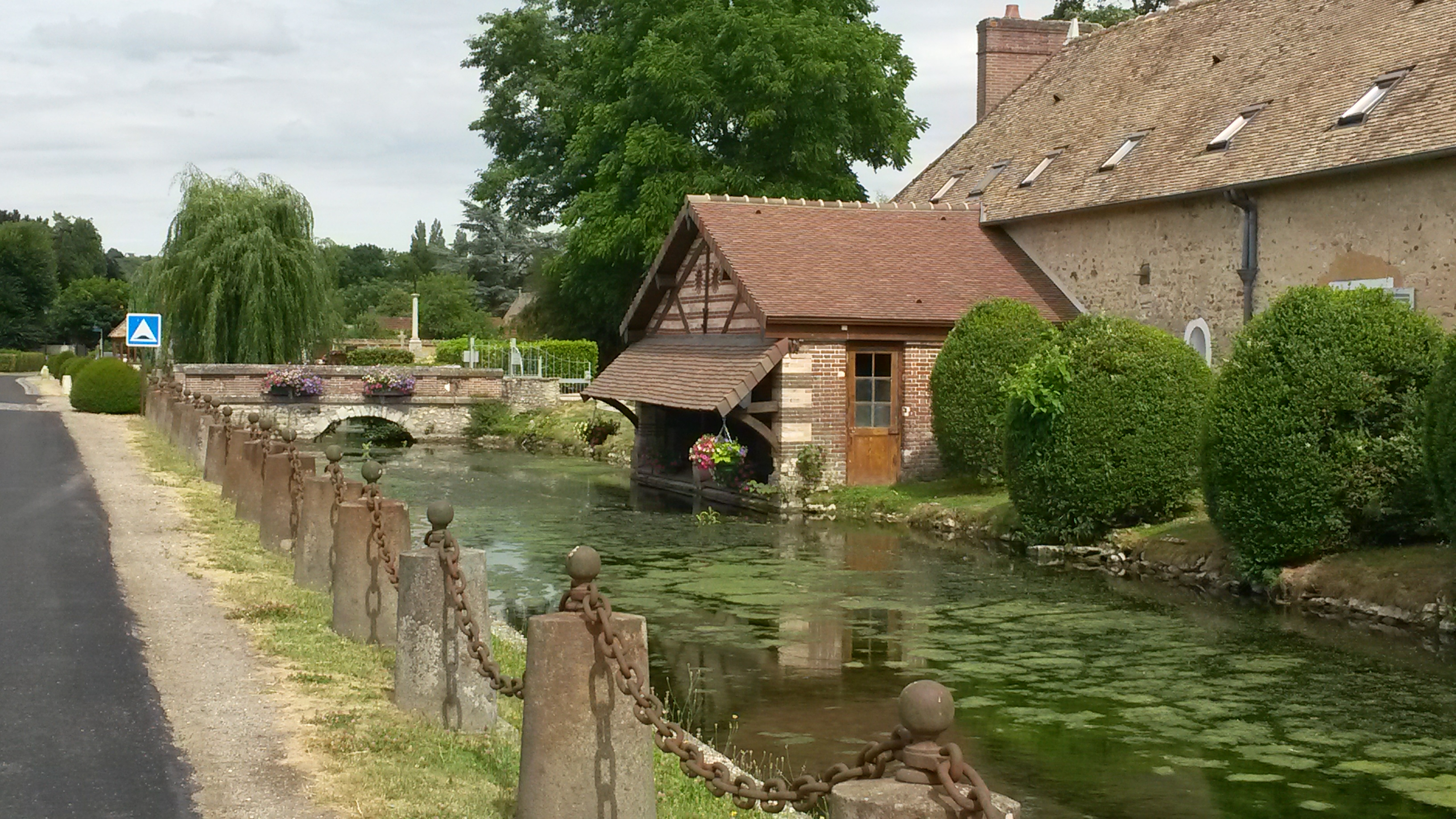 Ancien lavoir de Croisy sur le canal du château.